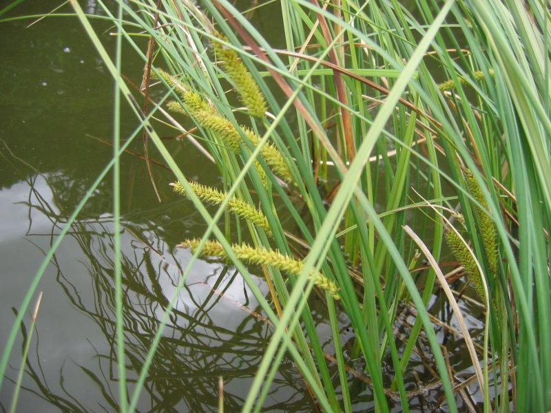 Schnabel-Segge Carex rostrata, Weißer See, Mecklenburg-Vorpommern